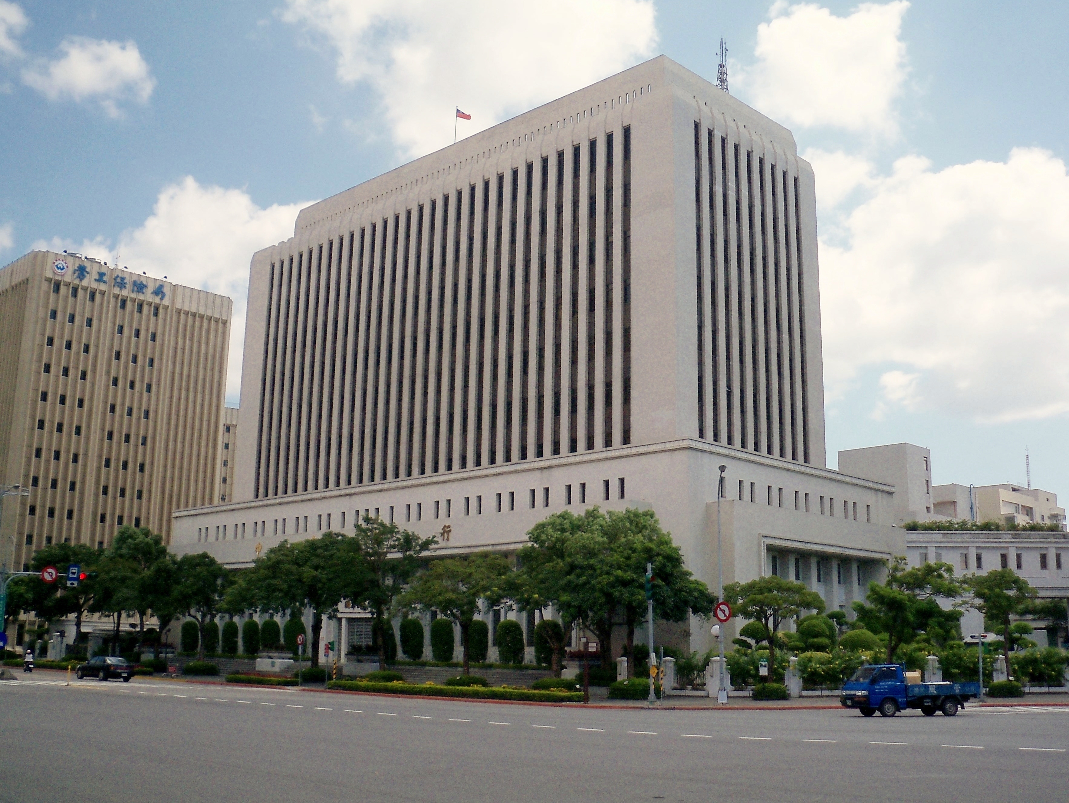 中華民國中央銀行第一總行大樓。